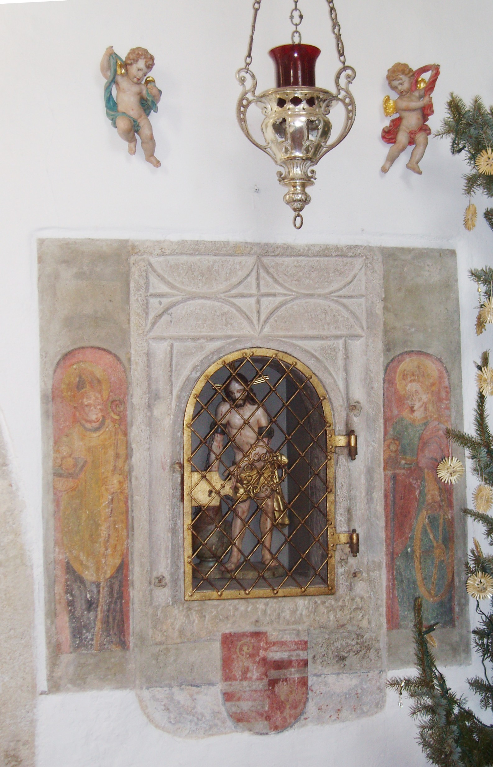 Gotische Sakramentsnische in der Kath. Pfarrkirche Ochsenfeld (Gemeindeteil von Adelschlag im oberbayerischen Landkreis Eichstätt)